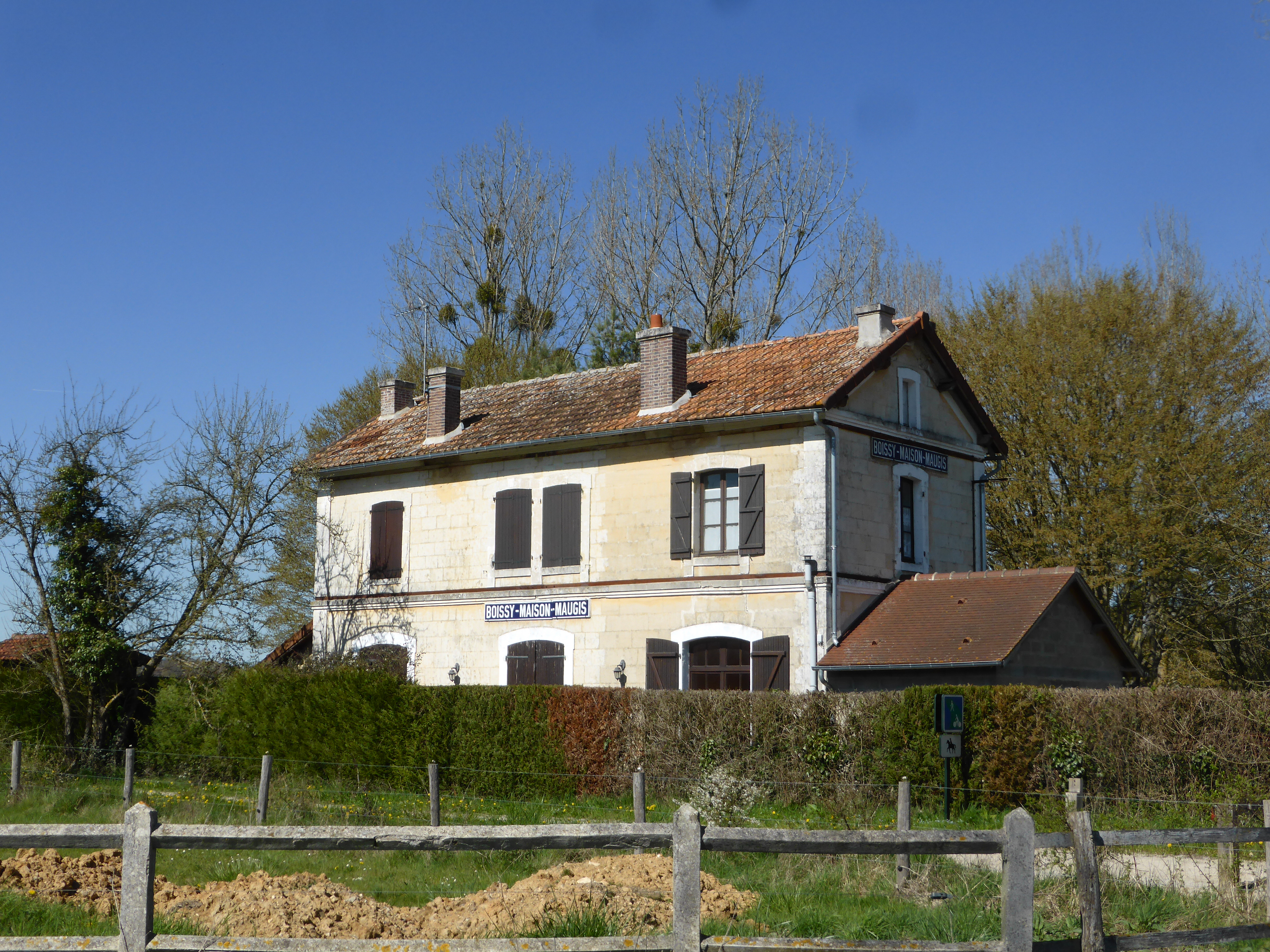 Ancienne gare de Boissy-Maison-Maugis, sur la ligne d'Alençon à Condé-sur-Huisne. Le bâtiment se trouve sur la commune de Maison-Maugis.